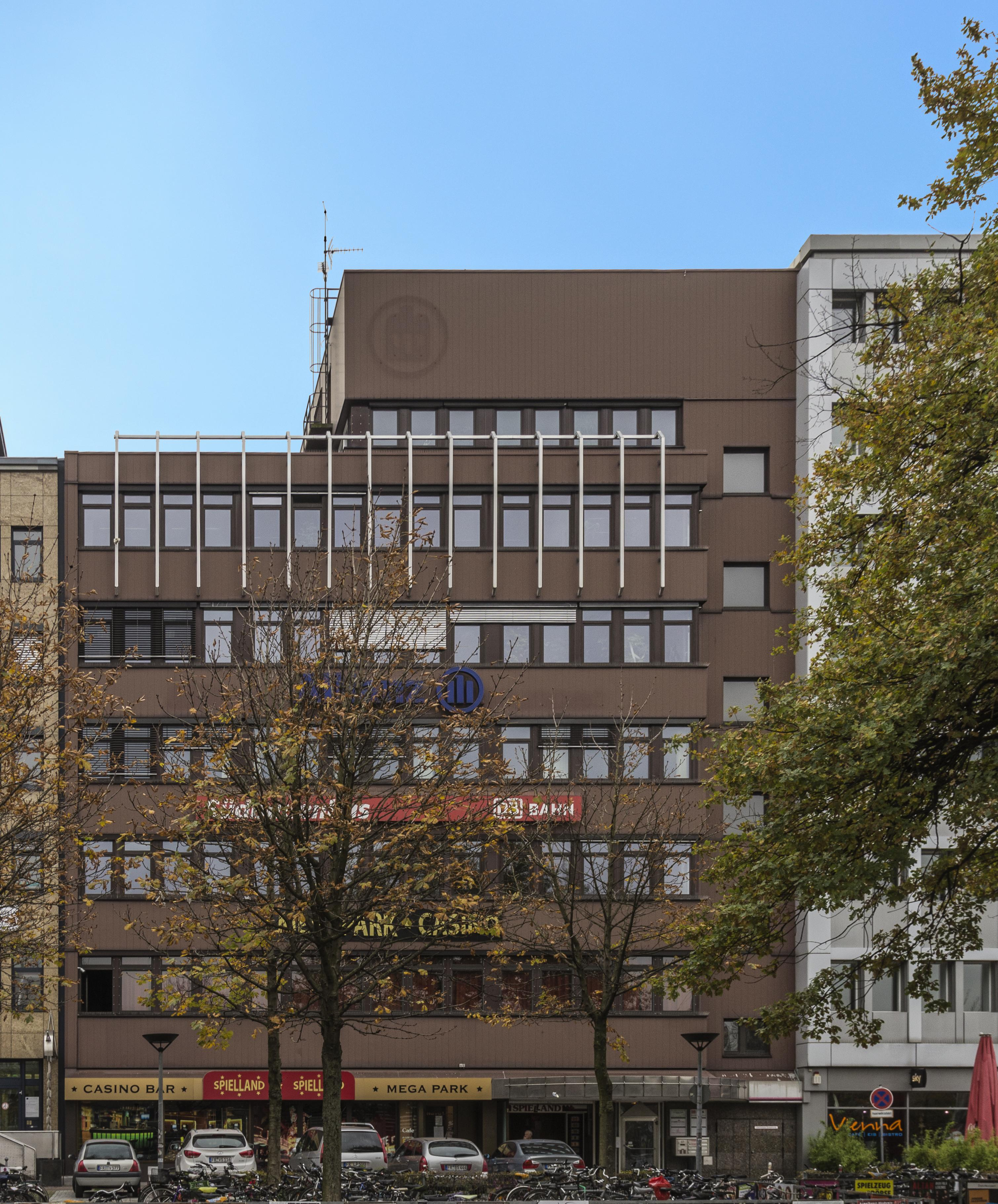 Gebäude in Freiburg im Breisgau